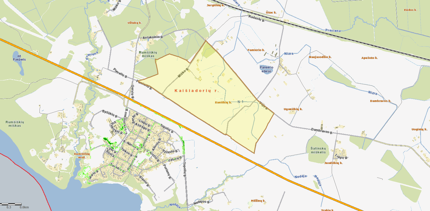 Baniškių kaimo teritorinės ribos